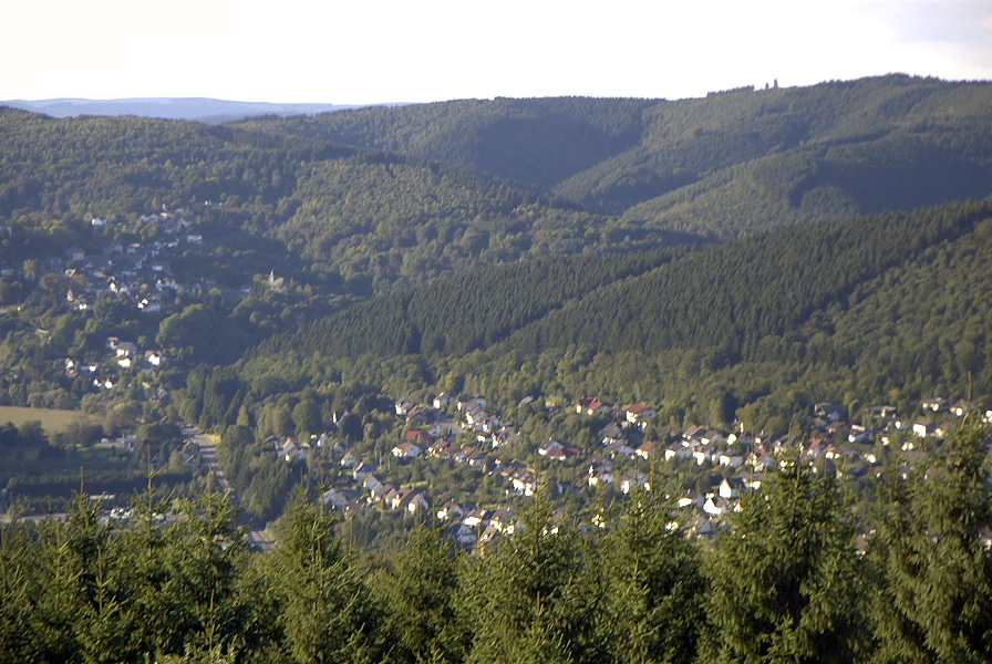 Aussicht vom Ottoturm in Kirchen-Herkersdorf im Siegerland